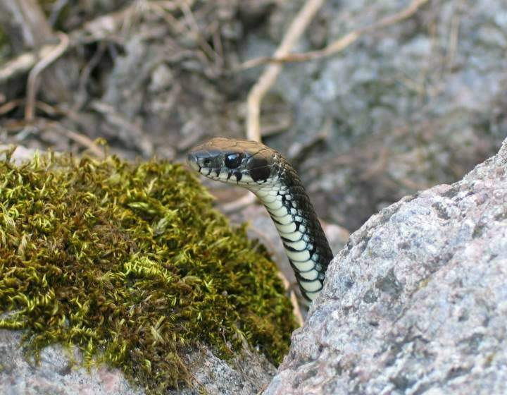 Natrix natrix natrix